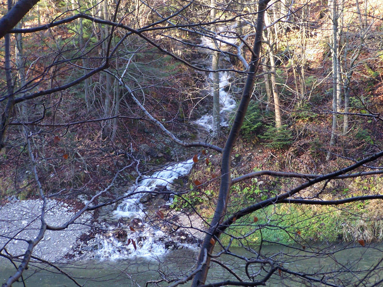 Pieński Potok (Pieniny)